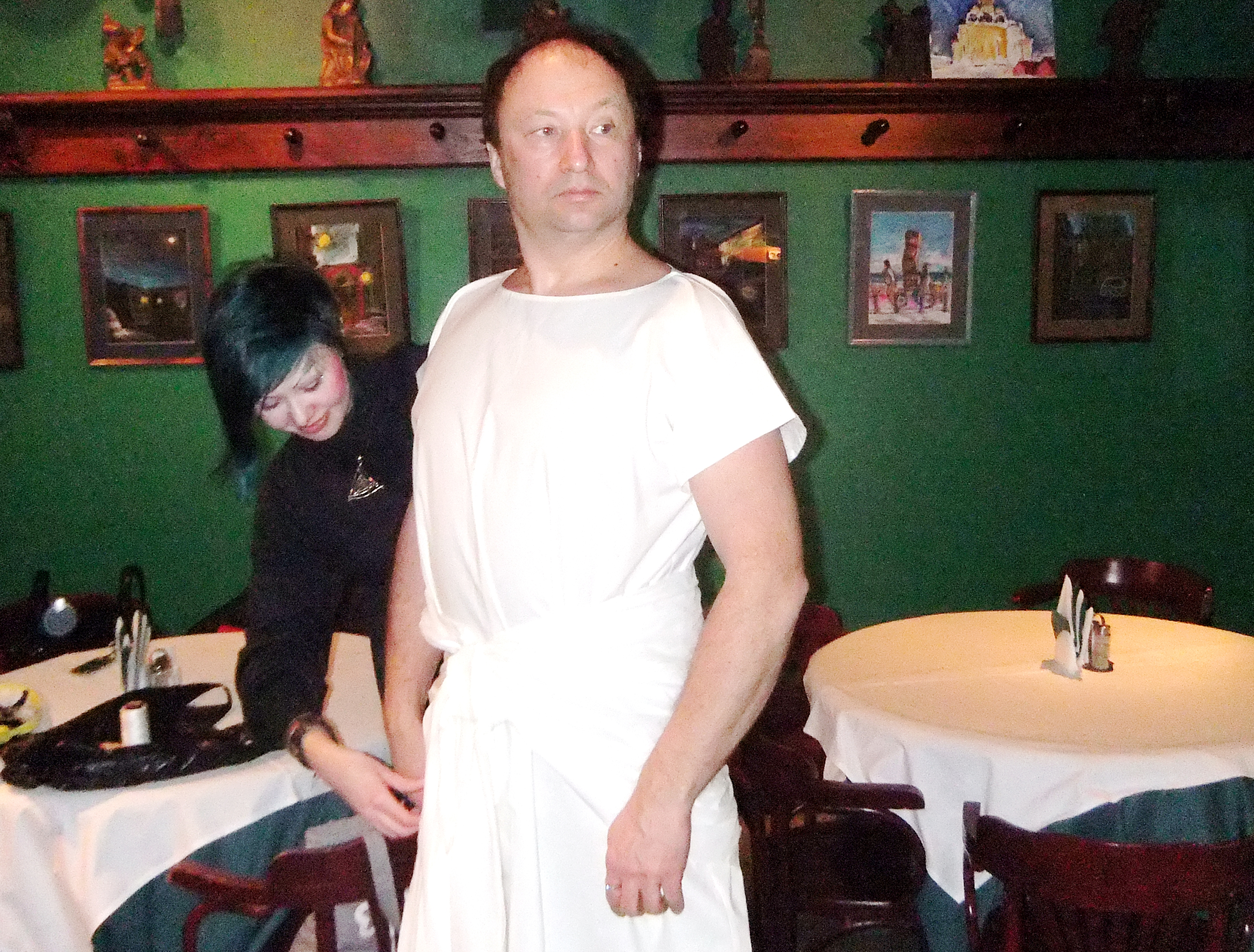 Художник по костюмам фильма "Вперед, Черная!" Маргарита одевает заслуженного артиста России Юрия Гальцева в наместники фараона.